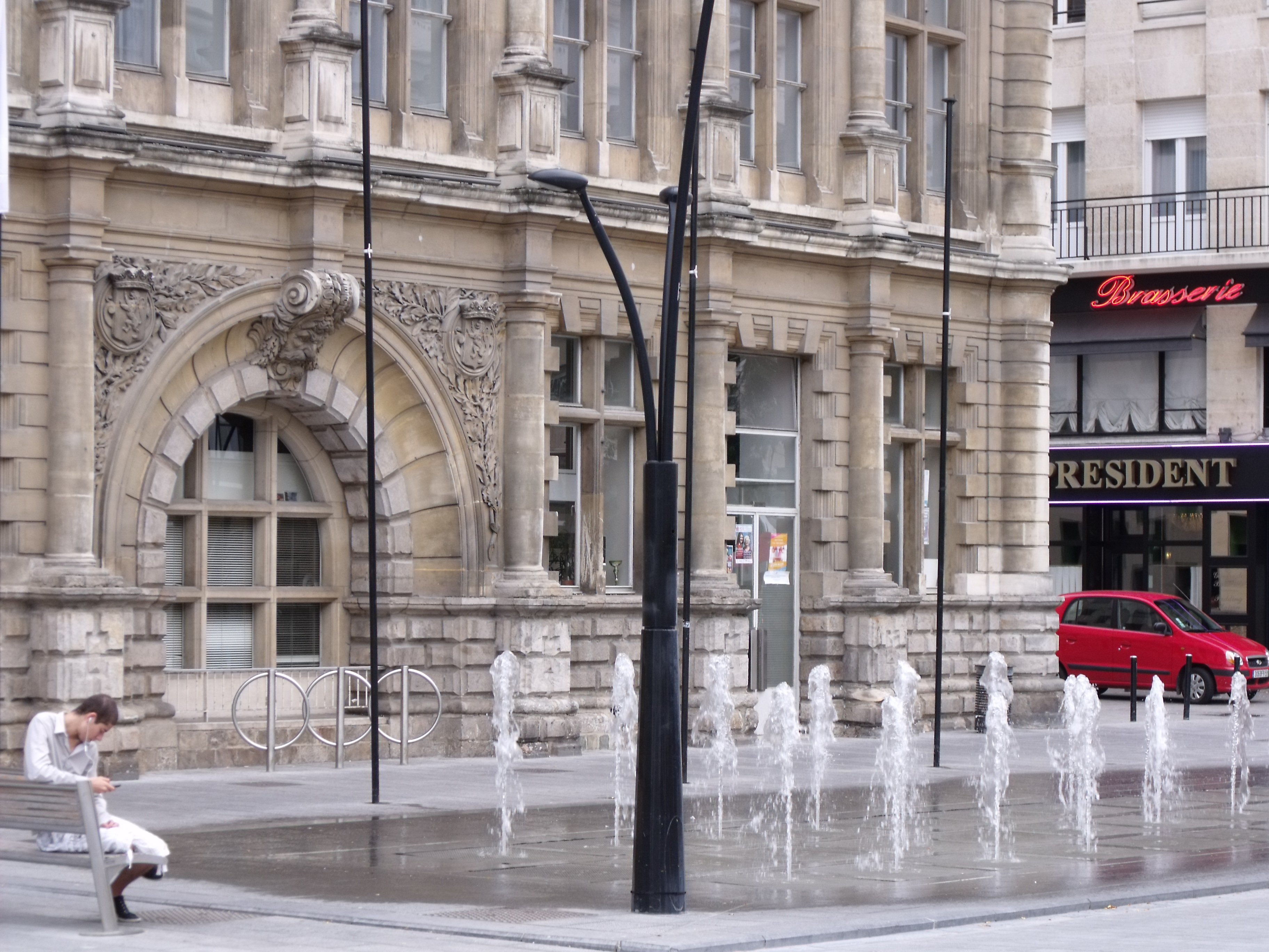 lampadaire à 3 branches et fontaines